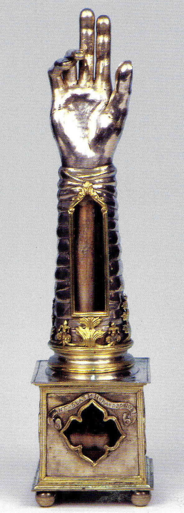 Reliquiario di san biagio (inizio XVI secolo, chiesa di san lorenzo, brescia)